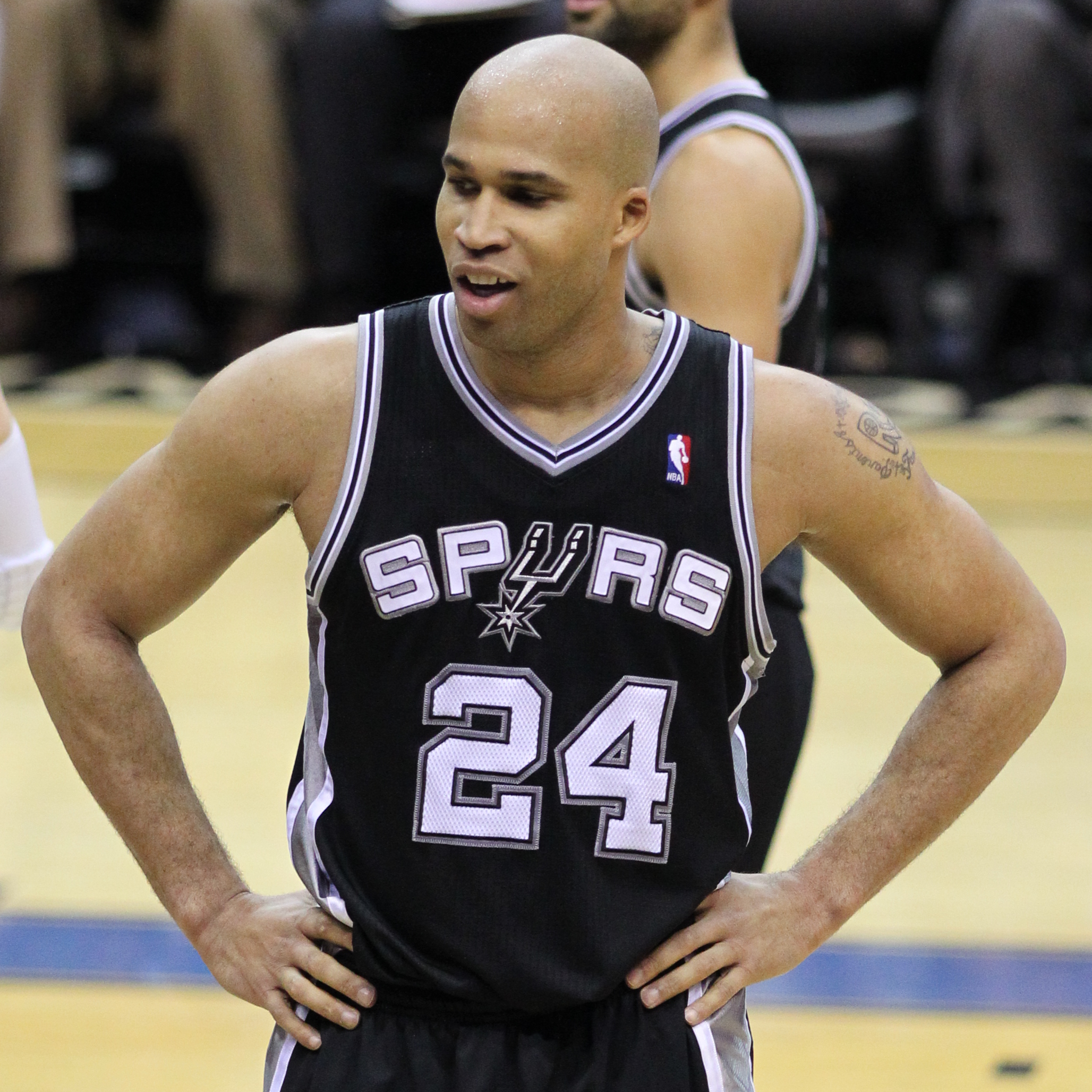 Wizards v/s Spurs 02/12/11